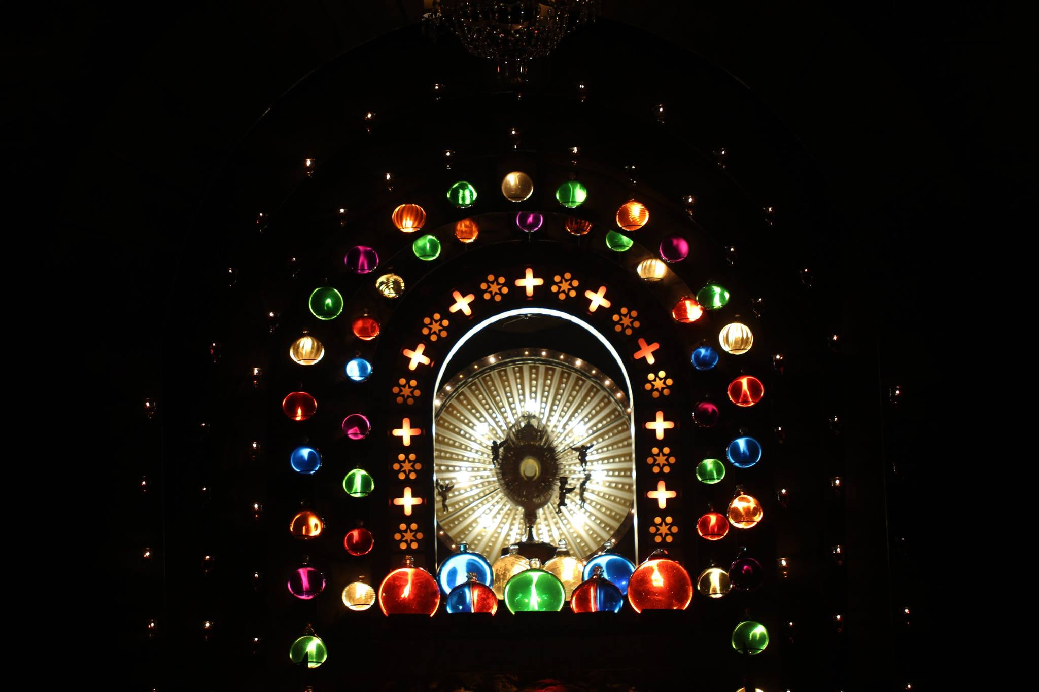 Heliges Grab 2017